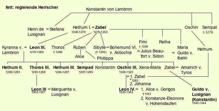 Stammbaum der Hethumiden, Auszug.